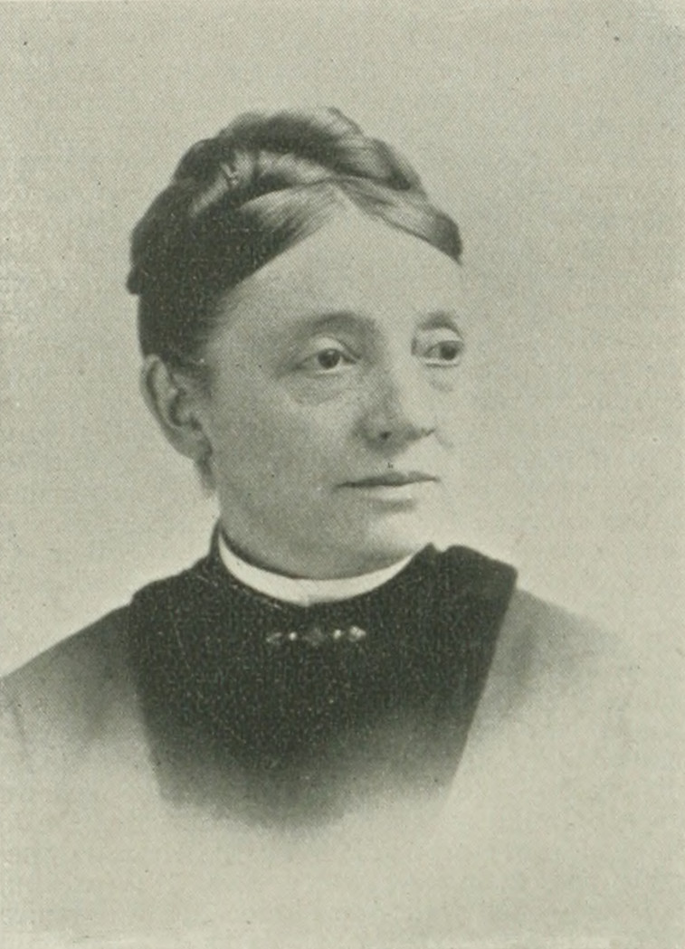 portrait from